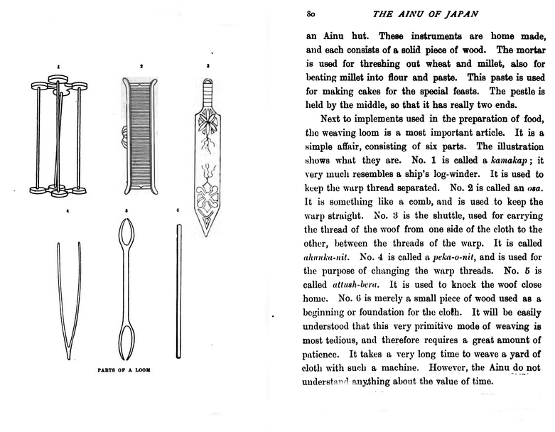 Dictionnaire de John Batchelor (1854-1944), The Ainu of Japan, 1892 ː outils de tissage.